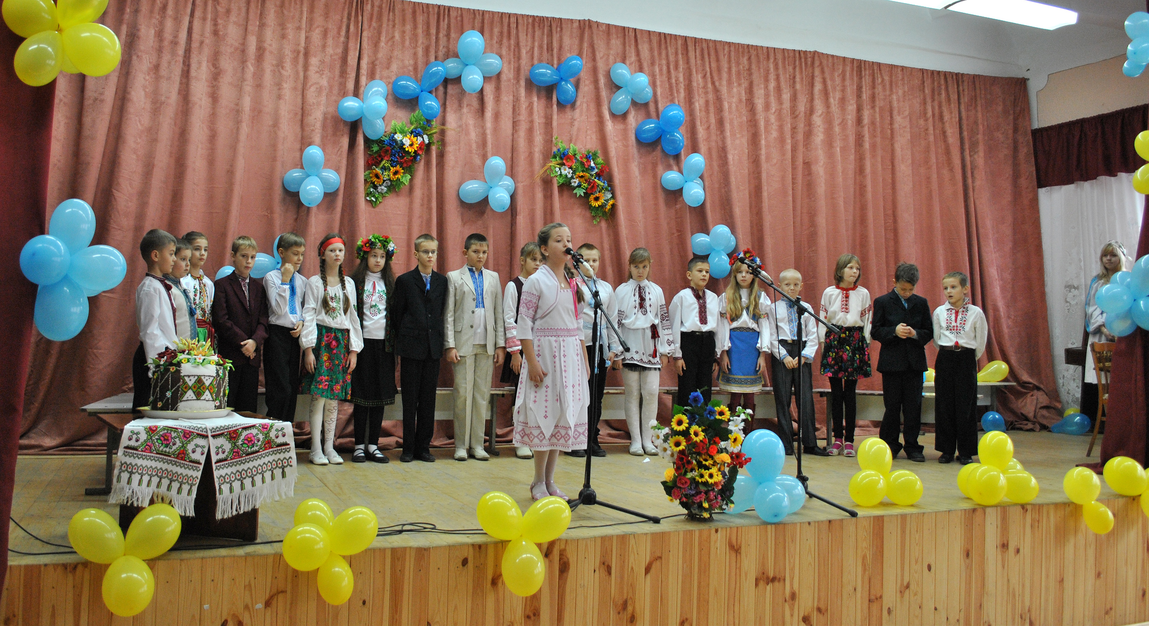 Виступають учні Тернопільської загальноосвітньої школи І-ІІІ ступенів № 20.